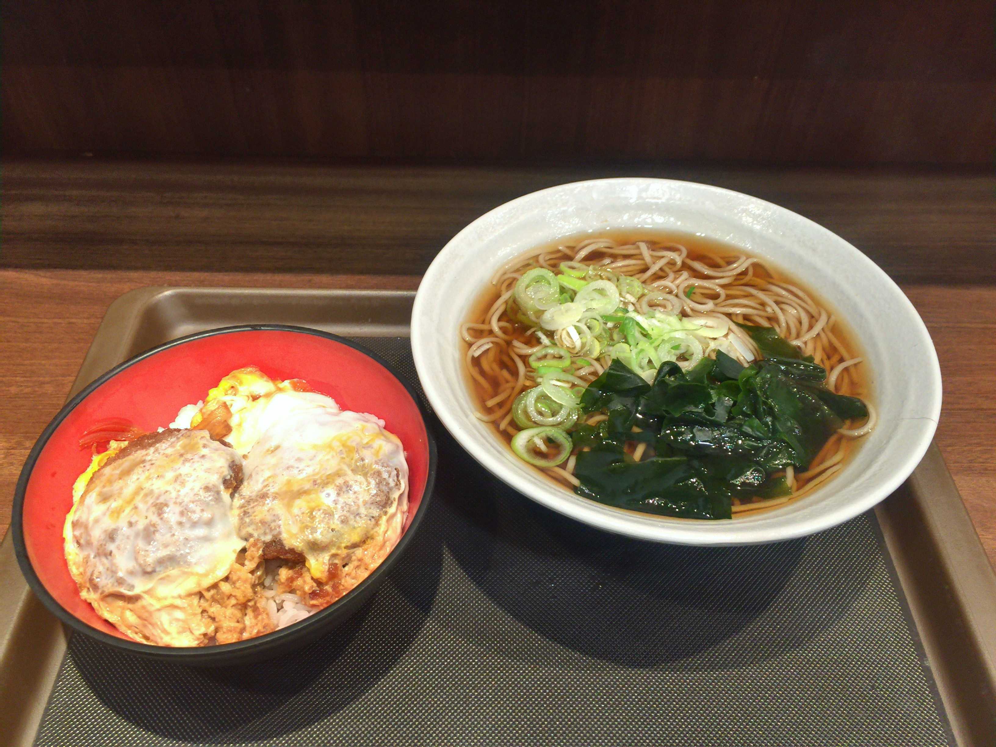 ミニヒレカツ丼セット(かけそば) 名代 富士そば 吉祥寺井ノ頭通り店 03-3398-3511 東京都武蔵野市吉祥寺南町1-2-7 三ツ浜ビル 1F